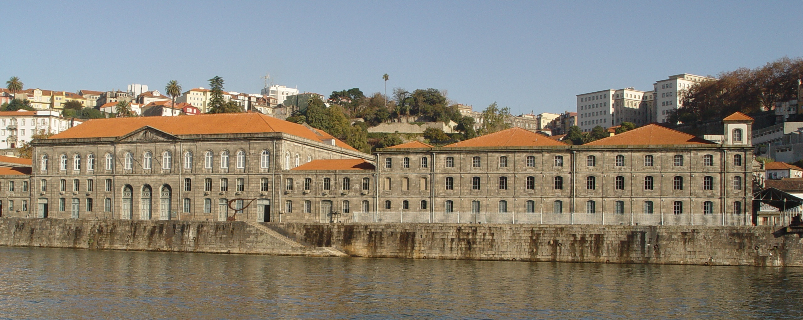 Alfandega in Porto Portugal